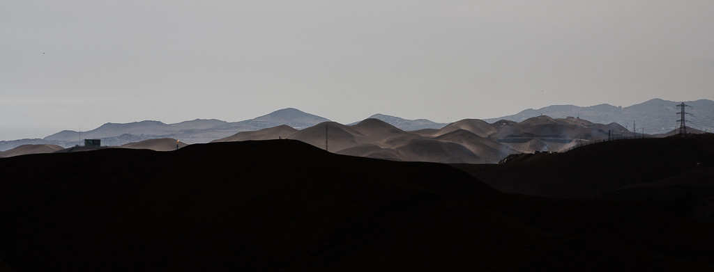 Desierto alrededor de la huaca Paraíso.